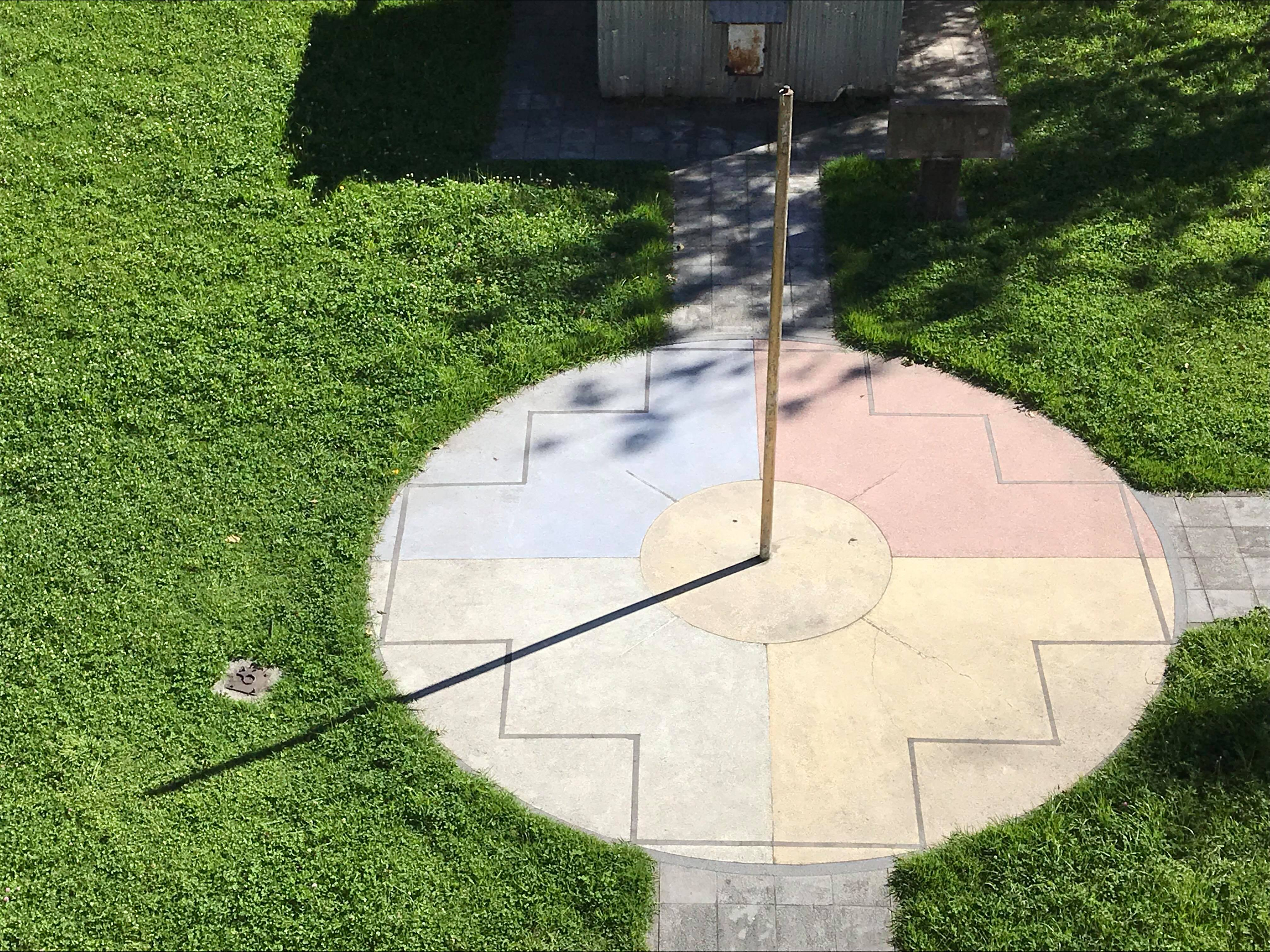 chacana_Cruz andina ubicada en el Observatorio Astronómico de Quito